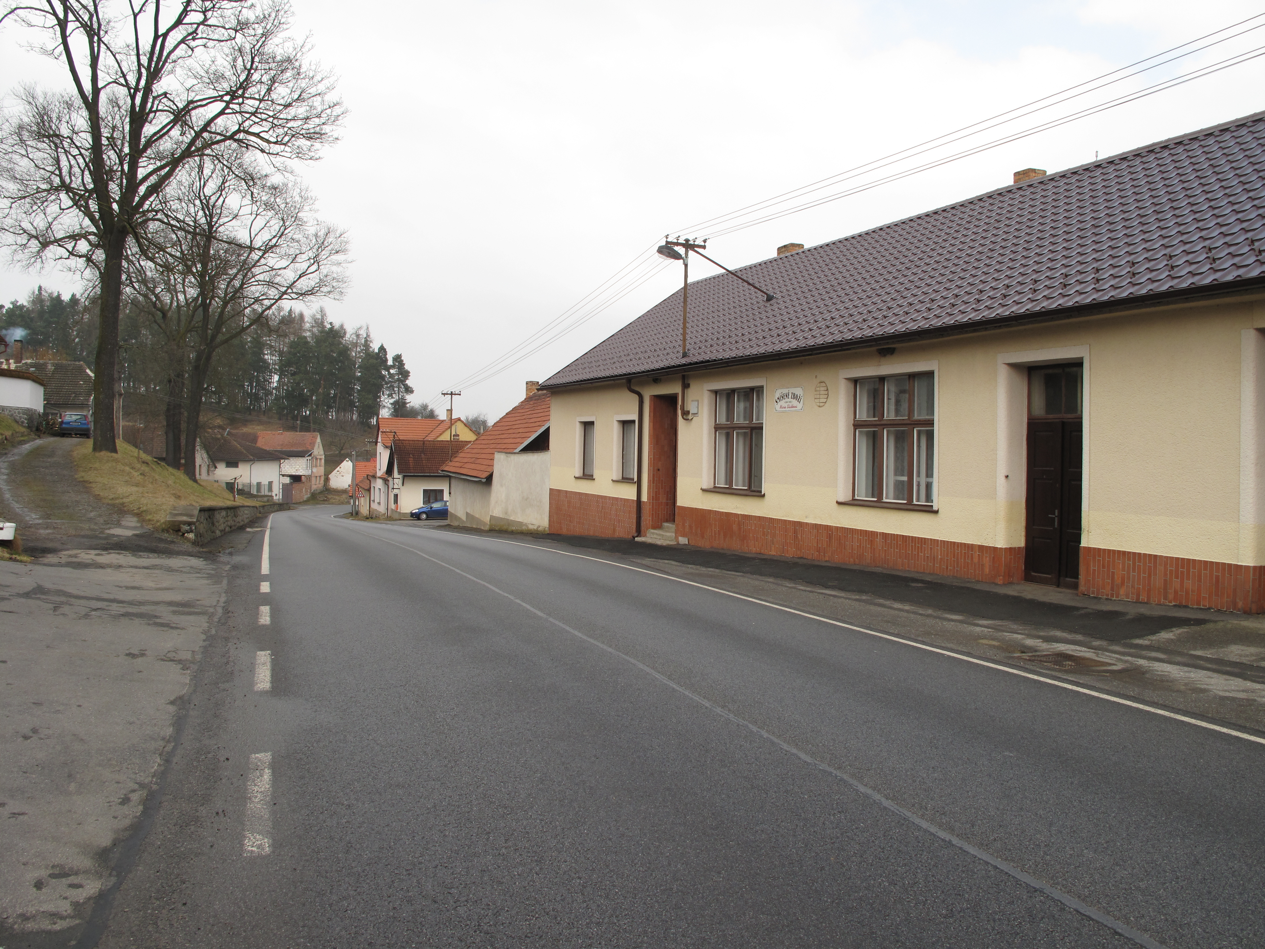 Silnice v Újezdci. Okres Prachatice, Česká republika.